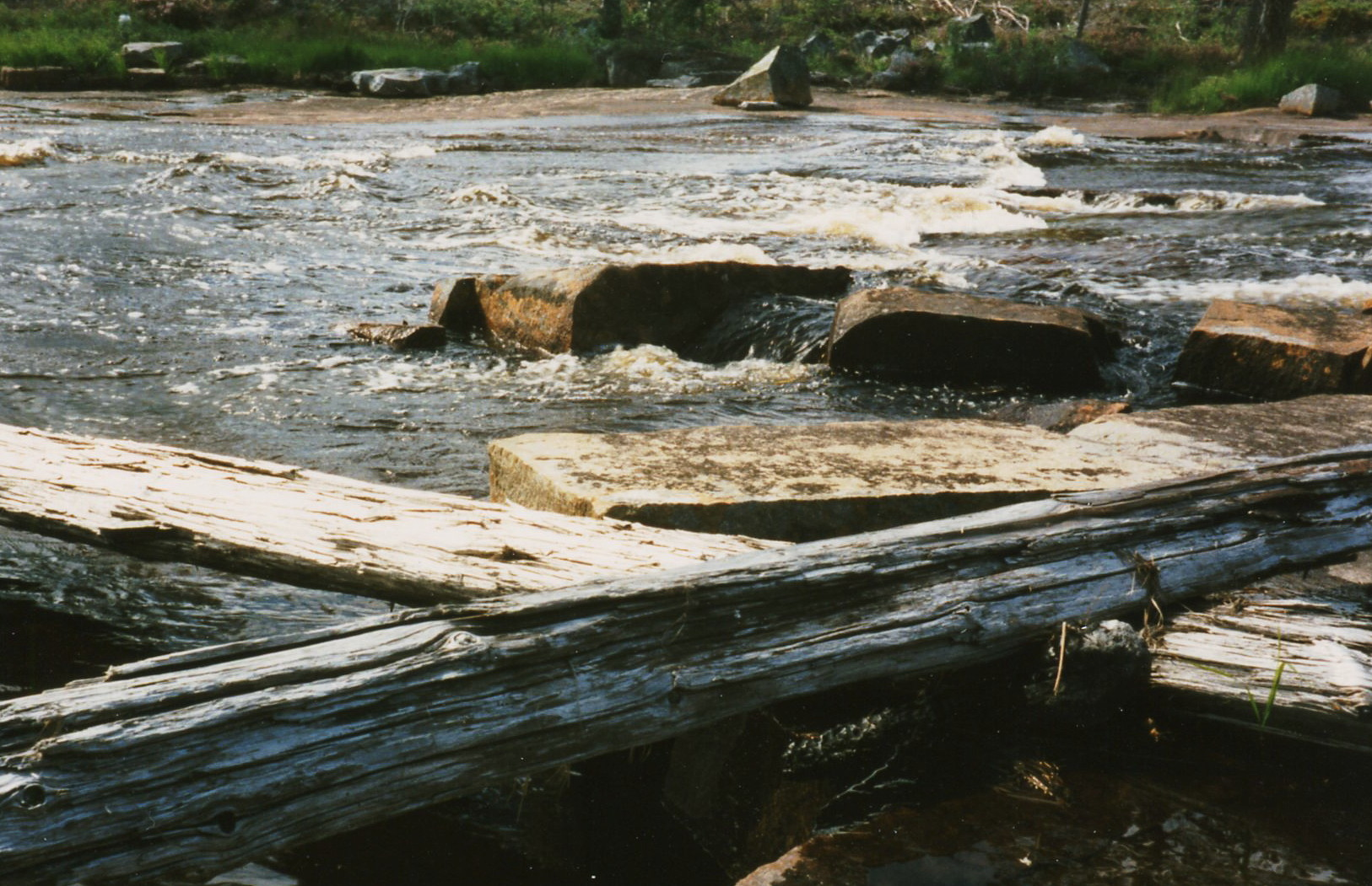 Pajsoån 1992